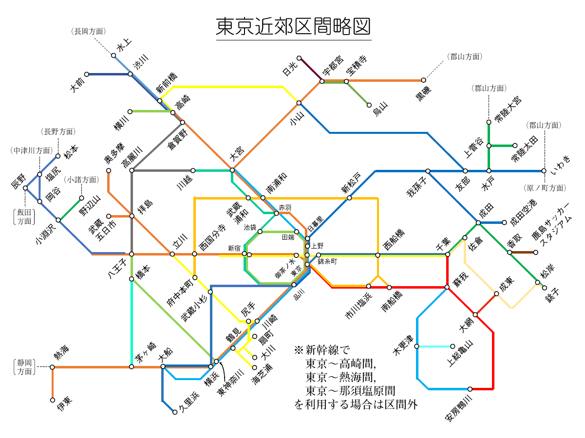 東京近郊区間路線図